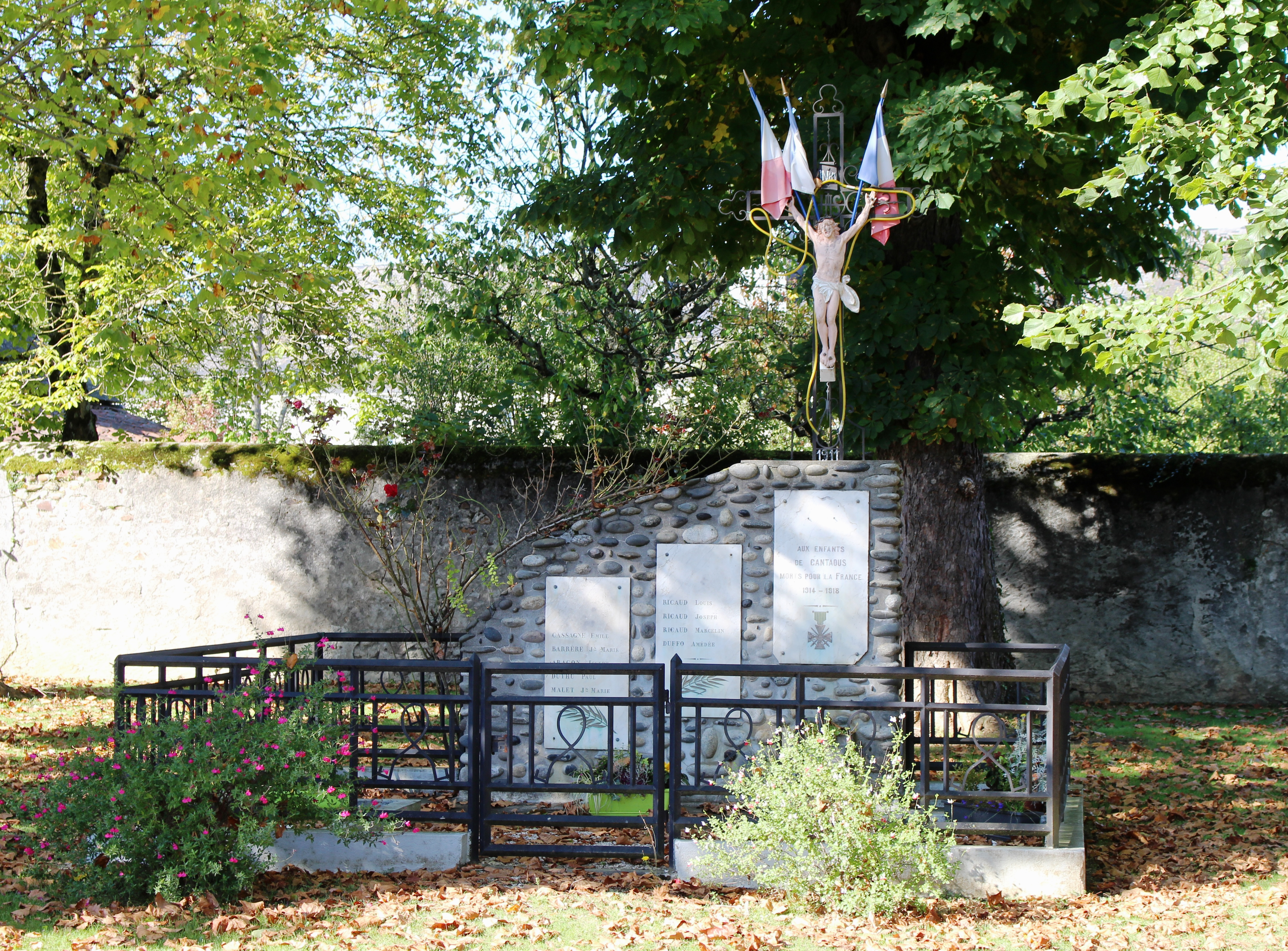 Monument aux morts de Cantaous (Hautes-Pyrénées)